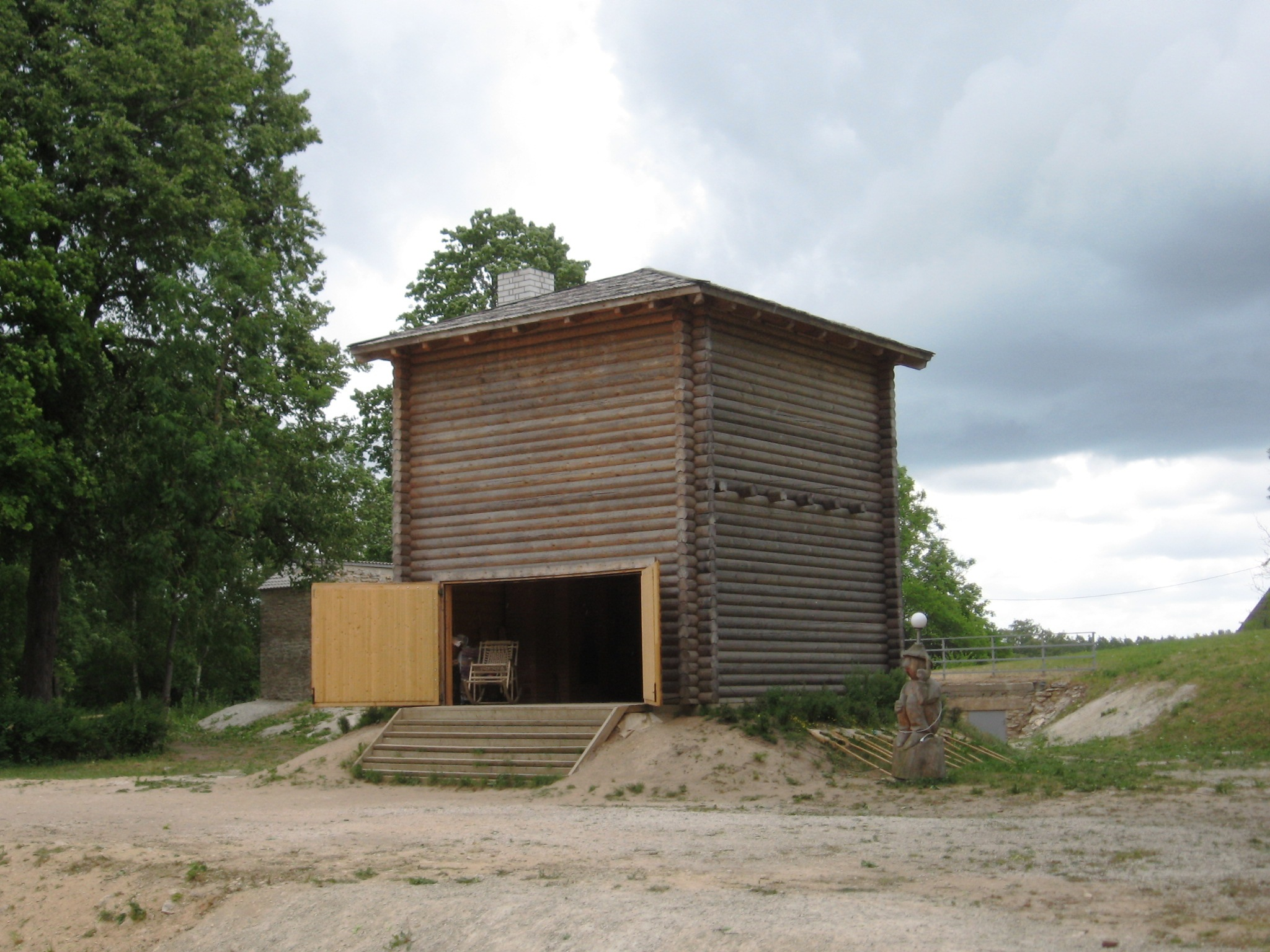 Kilplala peahoone